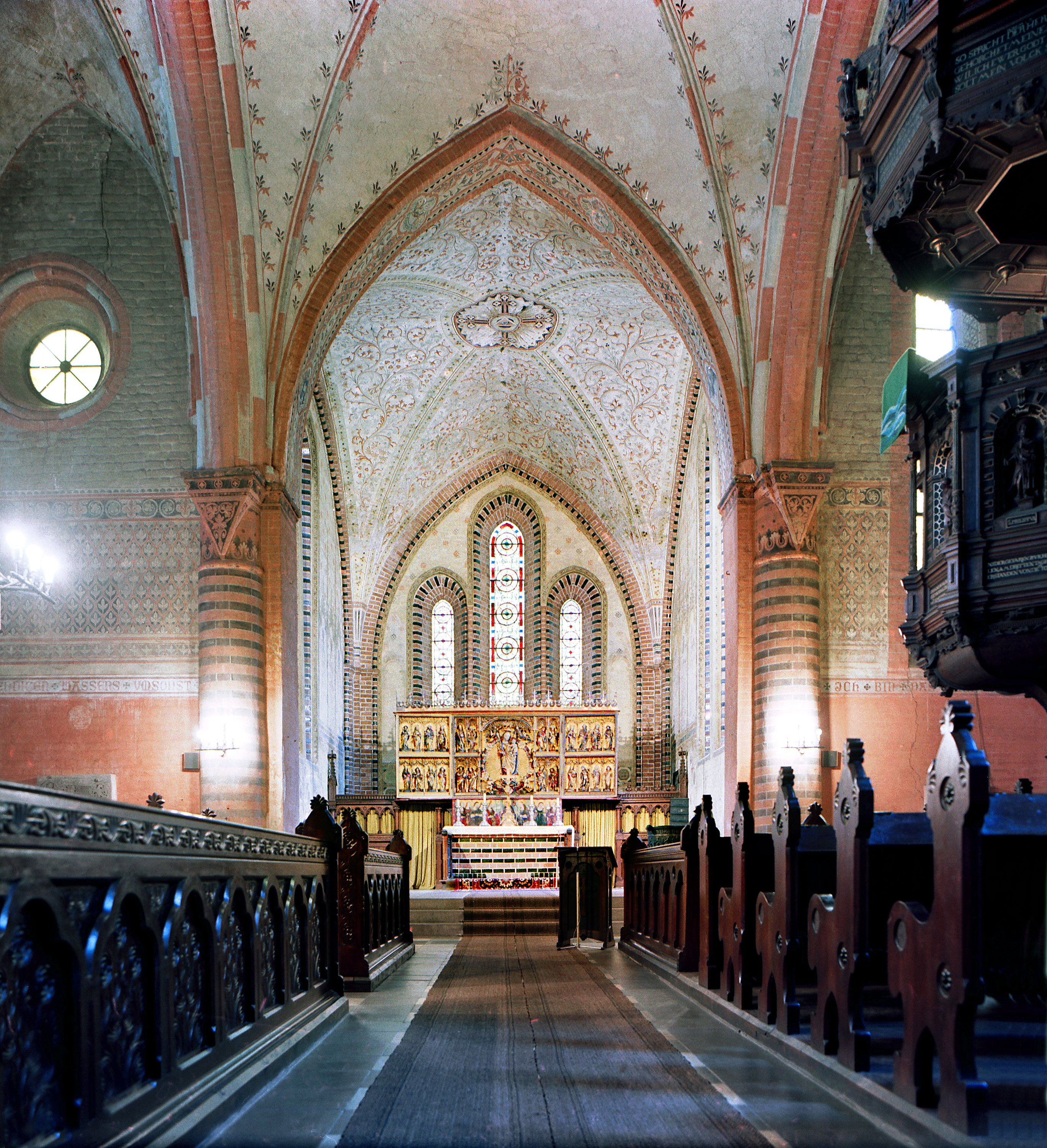 19.09.1987 DDR 2850 [19370] Parchim, St. Marien-Straße (GMP: 53.428314,11.840638): Pfarrkirche St. Marien. Dreischiffige Backstein-Hallenkirche (begonnen 1250, geweiht 1278), frühgotischer Turm (Anf. 14. Jh.). Die Gewölbe und die Strebepfeiler der Hallenkirche stammen aus dem 14. Jahrhundert. Spätgotischer Altar mit doppelten Flügeln (im Schrein Maria in der Strahlensonne) um 1500. [R19870919C11.jpg]19870919620NR.JPG(c)Blobelt